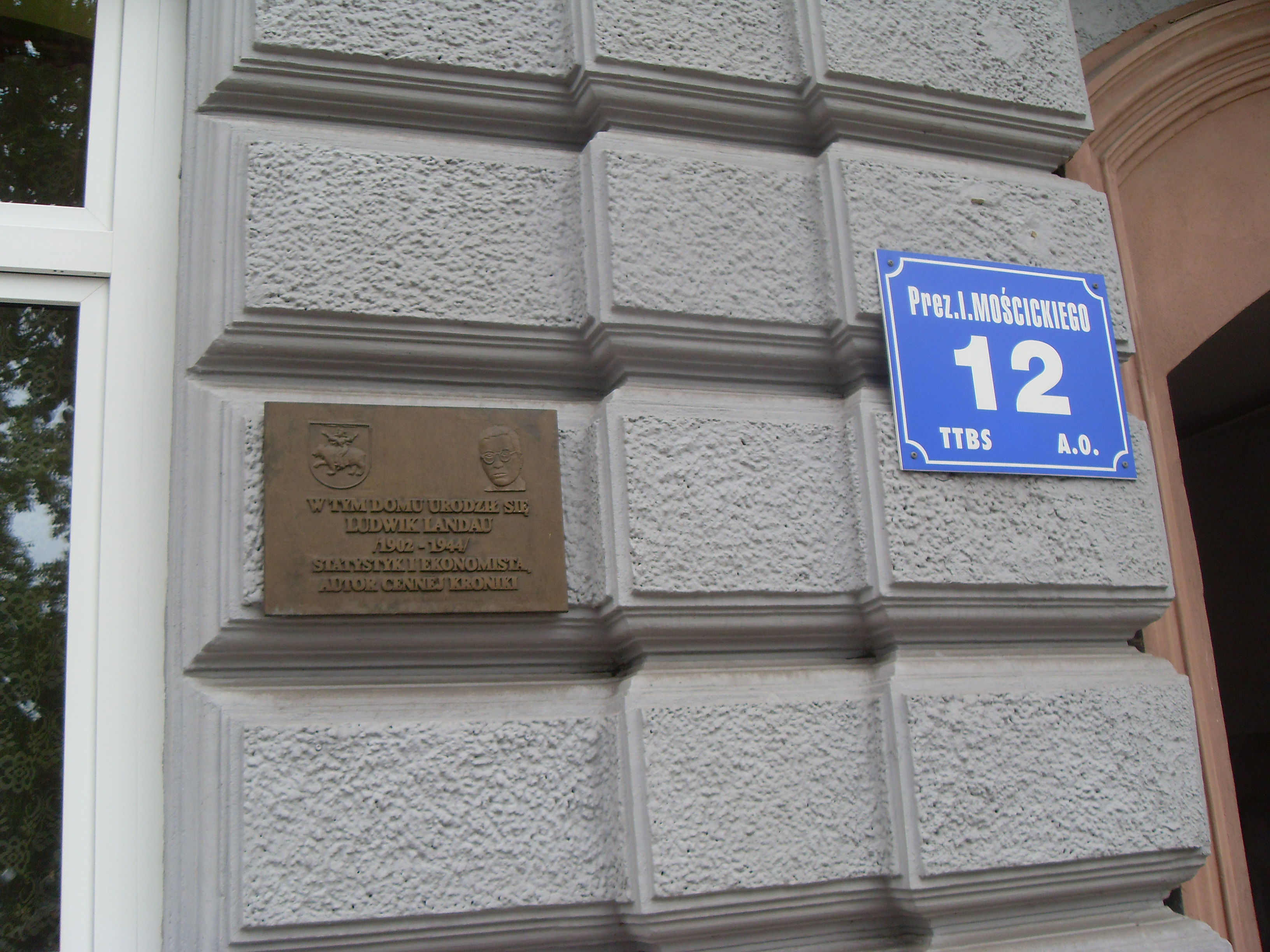 Tablica pamiątkowa ku czci Ludwika Landaua, na kamienicy w Tomaszowie Mazowieckim, w której mieszkał.